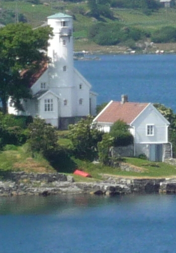 Høgevarde fyrstasjon ved Karmsundet